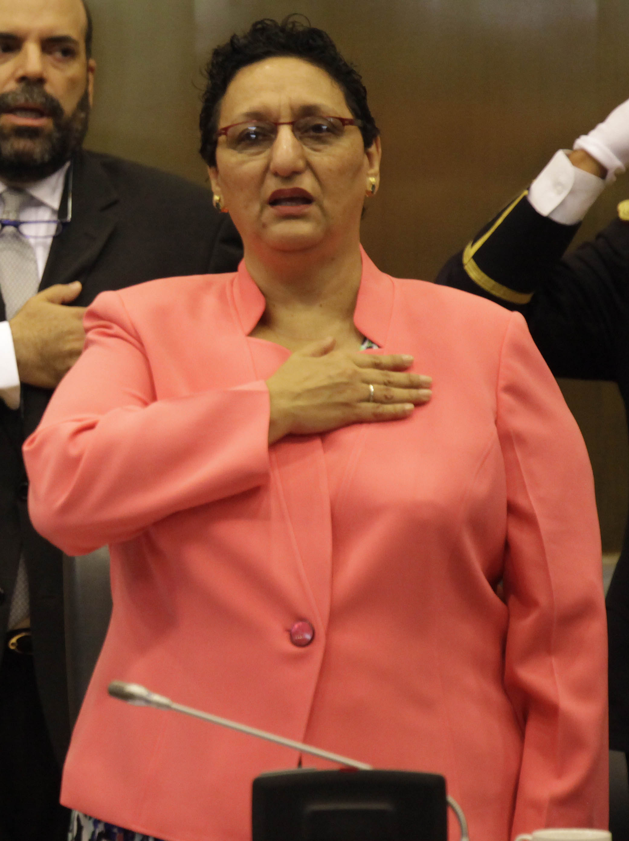 Salvador Sanchez Cerén y Lorena Peña , entonan el Himno Nacional.